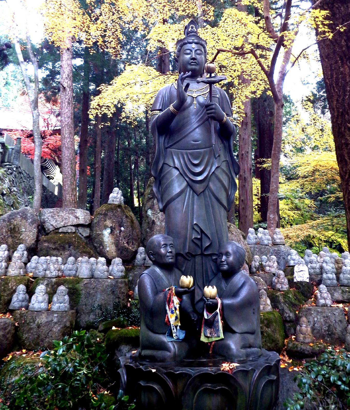 箸蔵寺のぼけ封じ観音